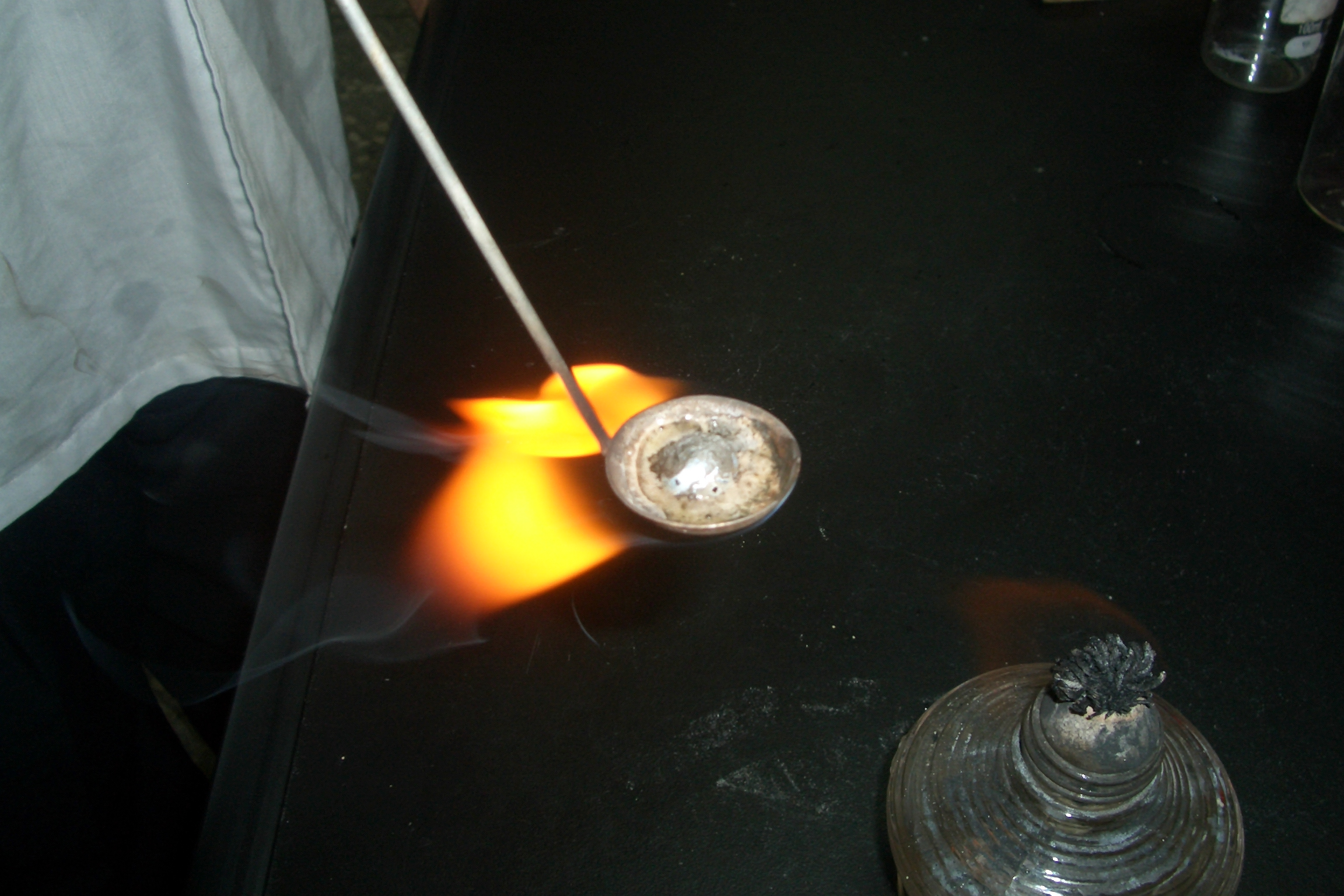 中文（台灣）: 燃燒鈉金屬